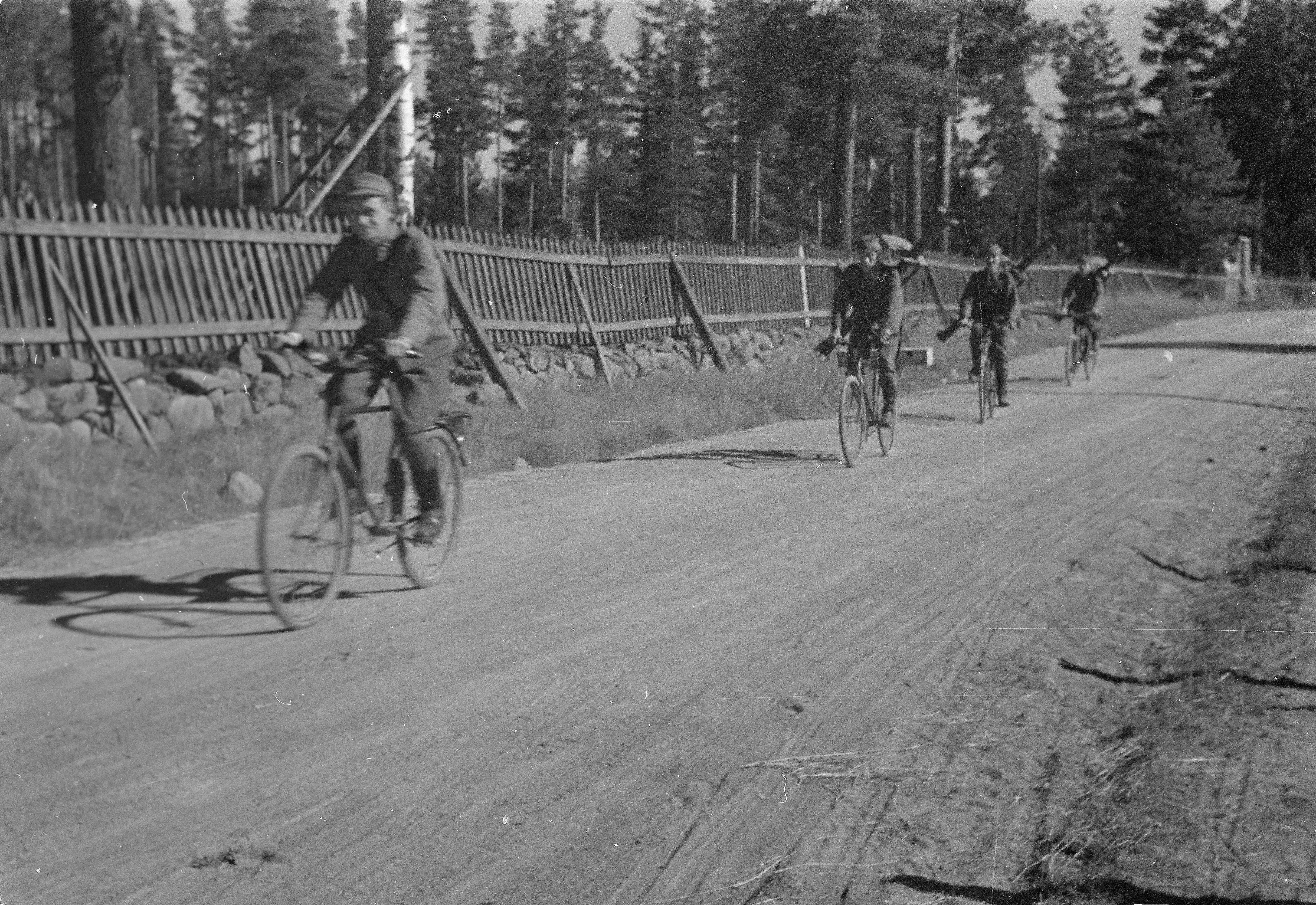 Polkupyörällä matkalla kohti Vuosalmen etulinjaa. SA-kuvat